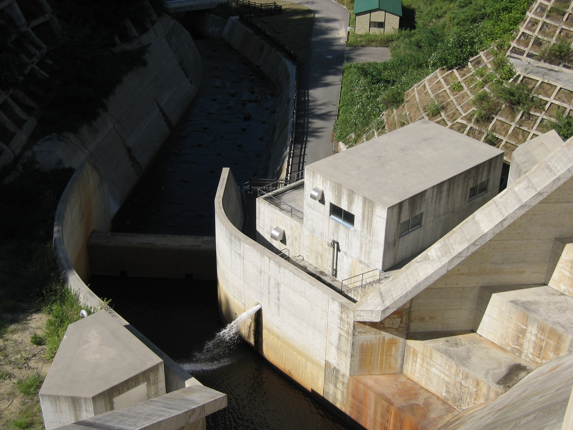 Onikuma Dam (小仁熊ダム) is a dam in Nagano, Japan.